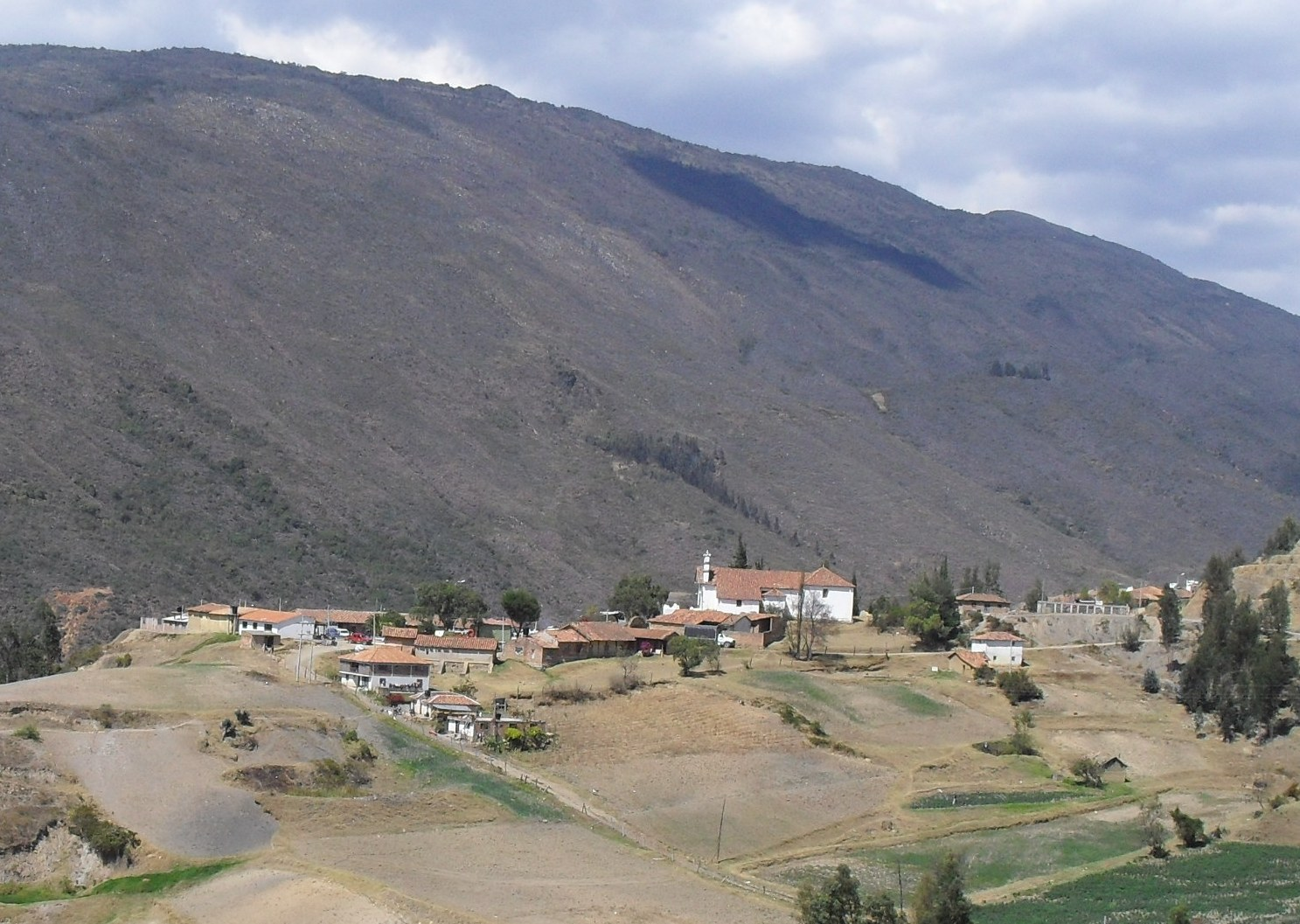 Panorámica del municipio de Chiquiza departamento de Boyacá Colombia